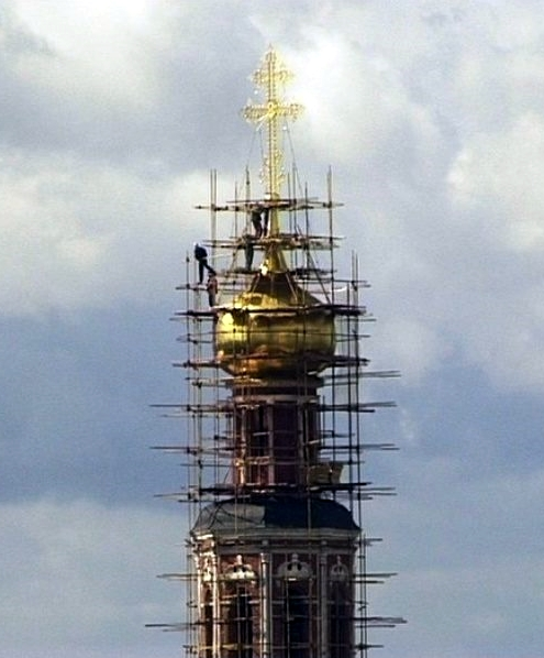 Установка креста на колокольне Новодевичьего монастыря после урагана 1998 года.